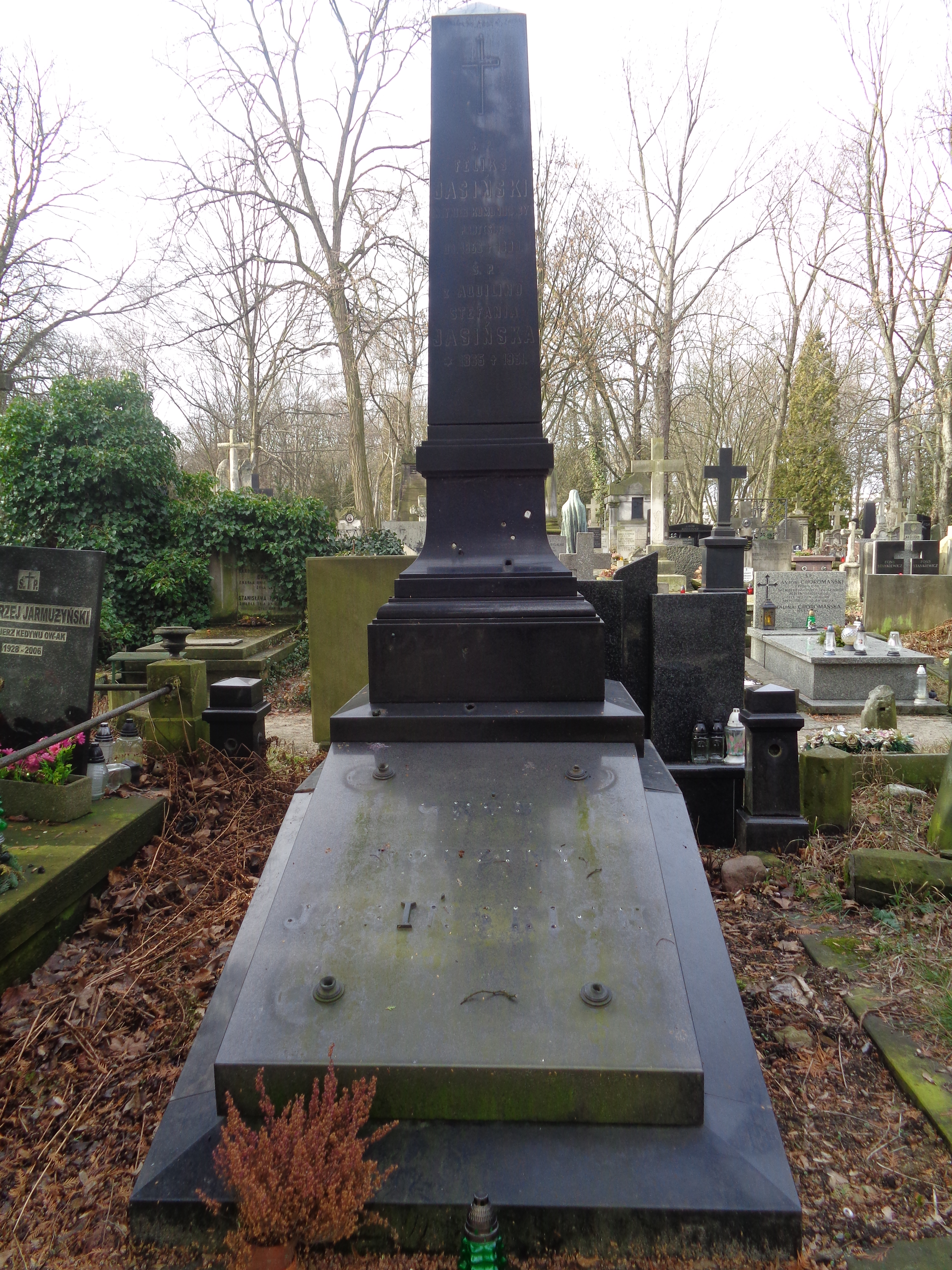 Grób Feliksa Jasińskiego na Cmentarzu Powązkowskim